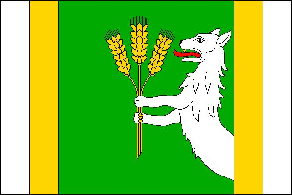 Vlajka obce Vlčice (okres Jeseník)